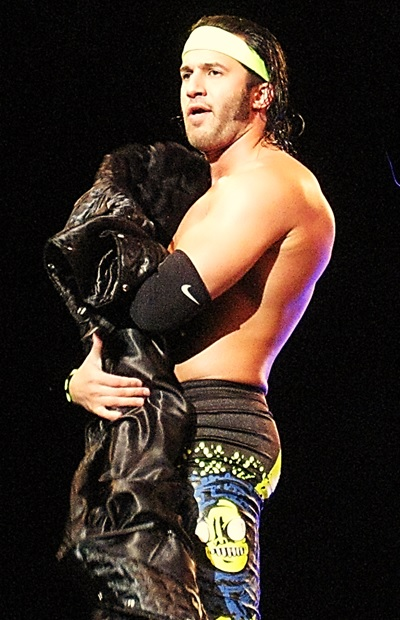 2015年3月22日 ベイコム総合体育館「Road to INVASION ATTACK 2015」バレッタ